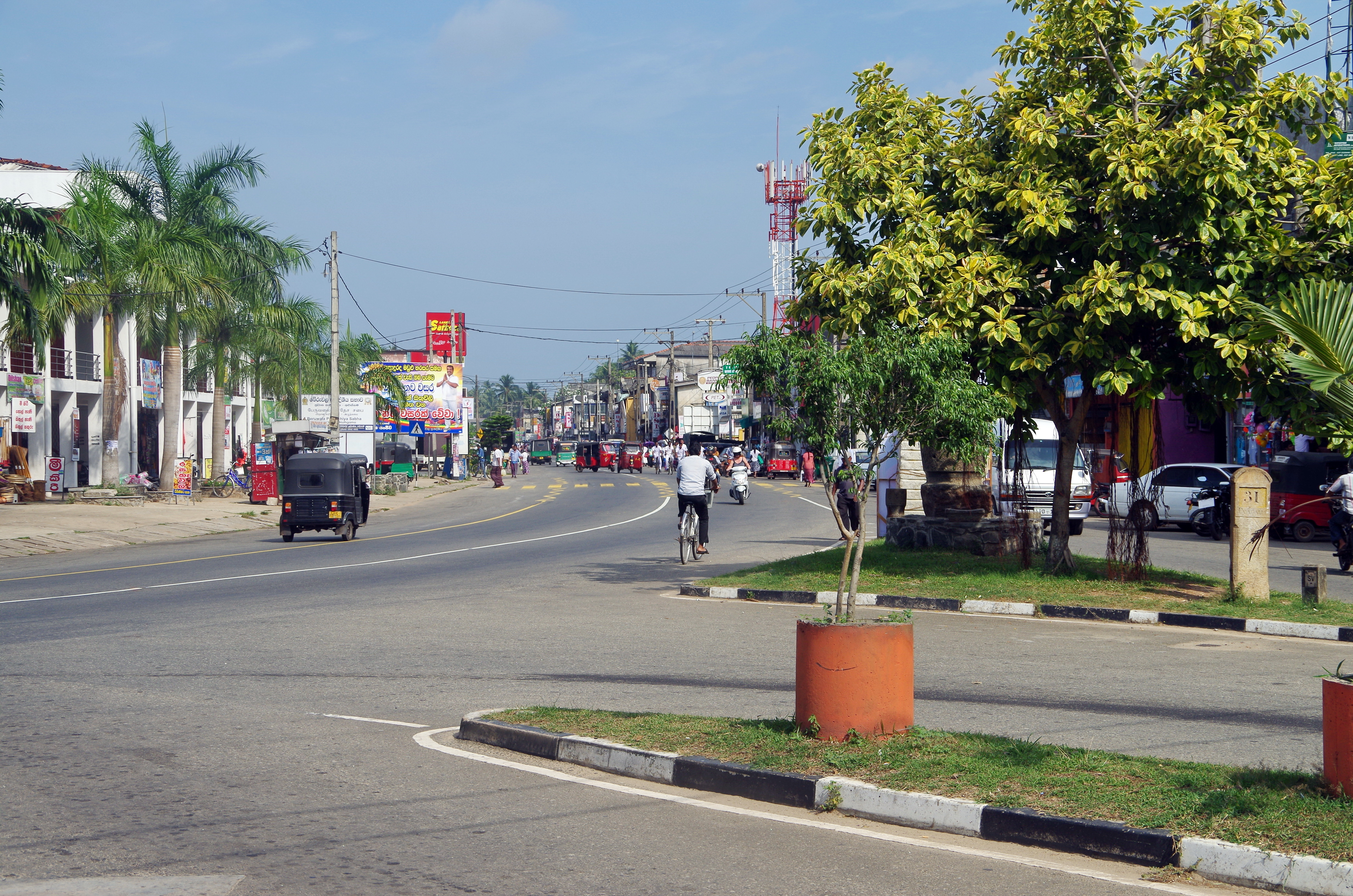 Hauptverkehrsstraße in Aluthgama